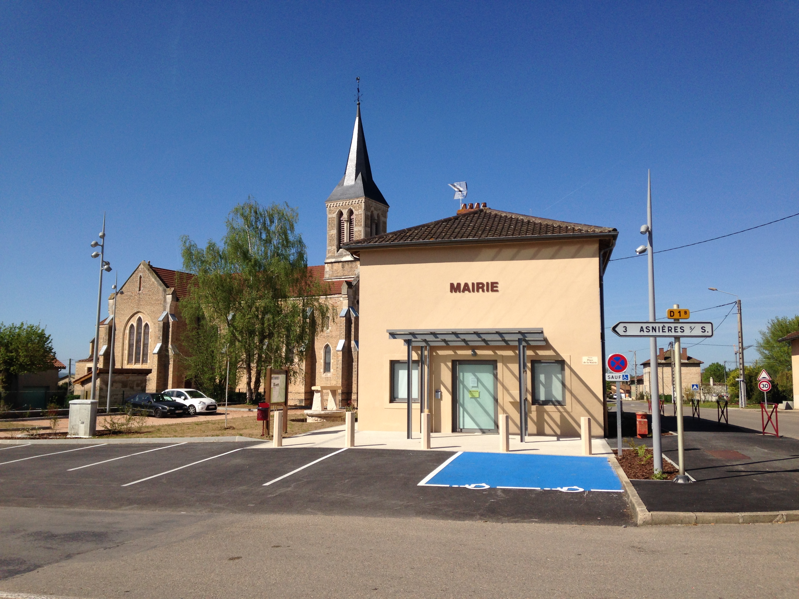 Vue sur la mairie et l'église du village d'Ozan